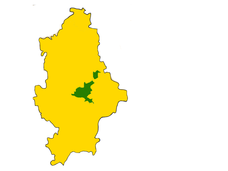 Bevölkerungsmehrheiten in der Oblast Donezk( absolut und relativ) Gelb: Ukrainische Mehrheit Grün: Russische Mehrheit